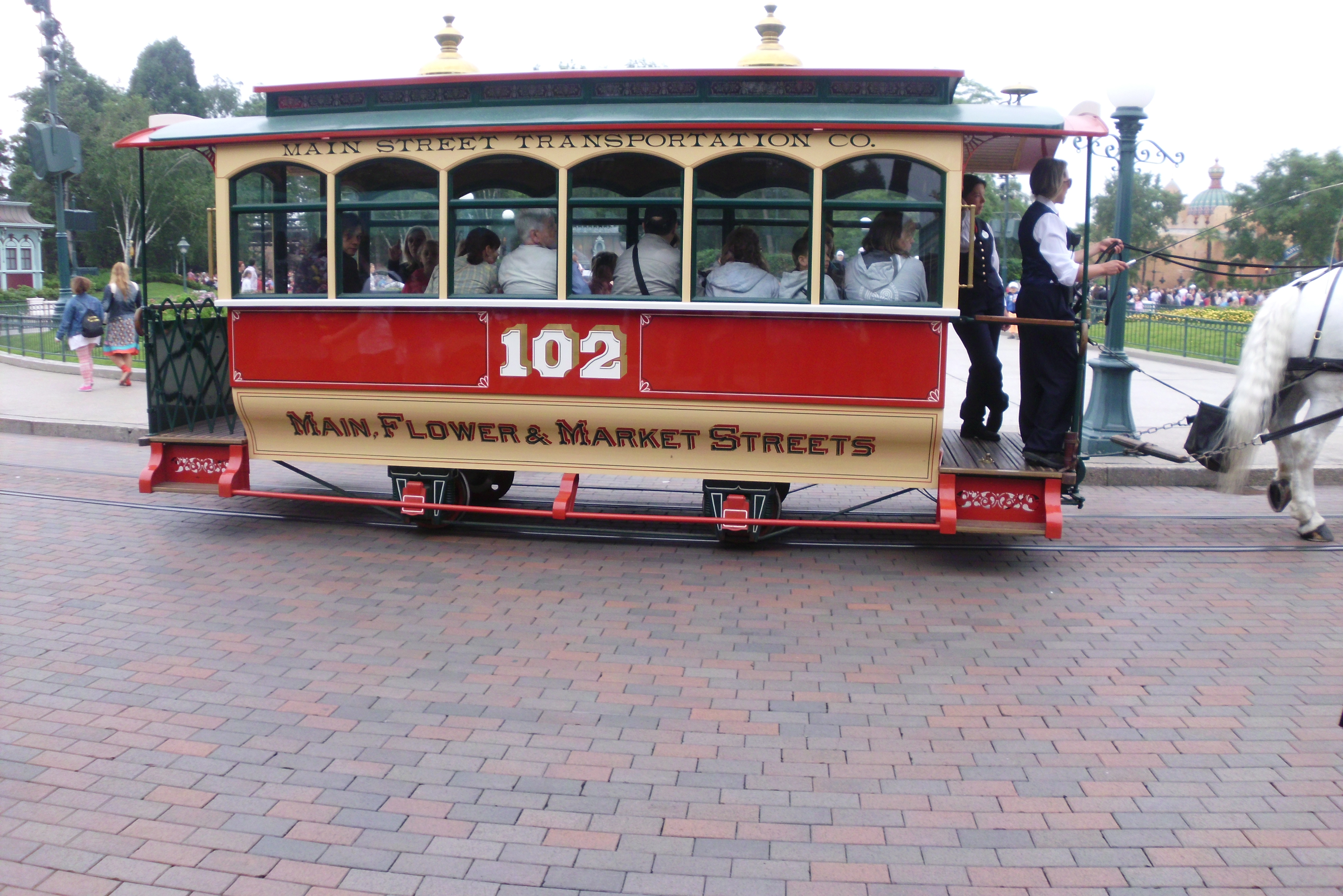 Disneyland Paryż 2013